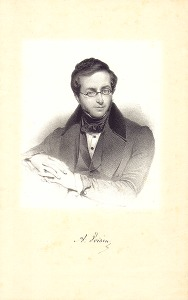 Portret van Auguste Voisin